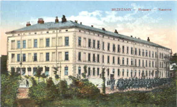 k.u.k. Infanterie Kaserne in Brzezany